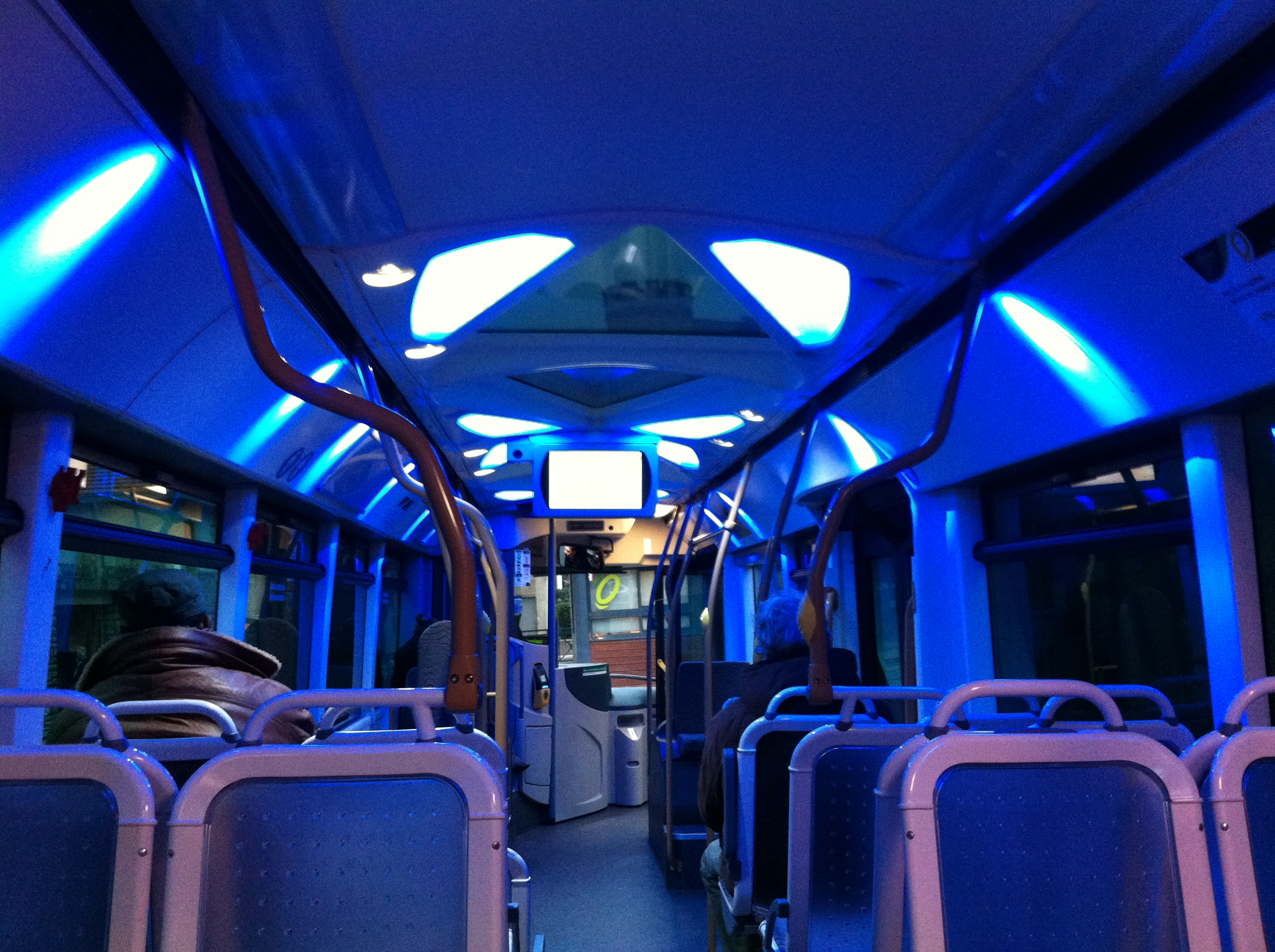 Intérieur d'un HeuliezBus GX 327 sur le réseau Chronoplus du réseau de transport de Bayonne (France)